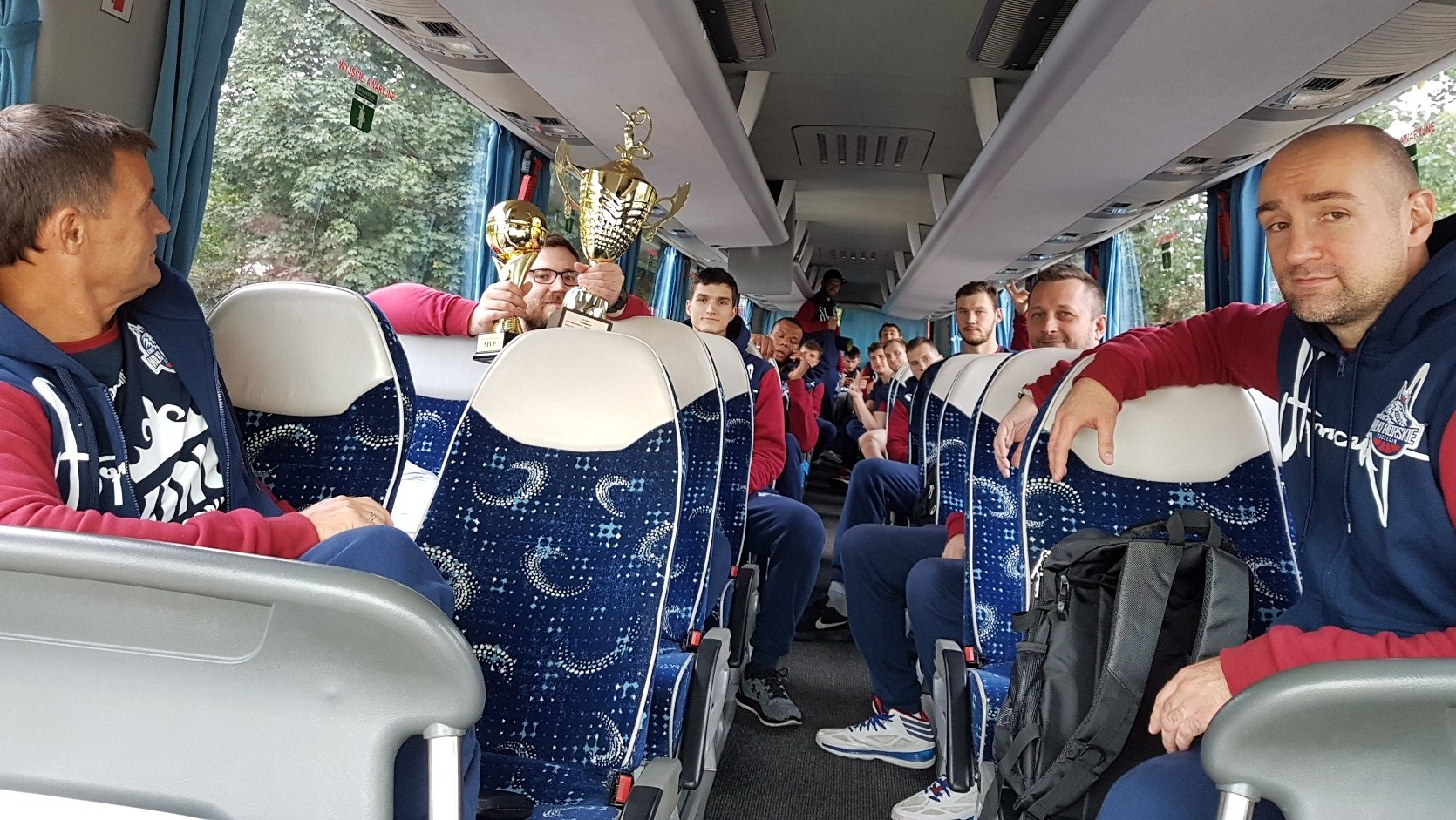 Memoriał Wysockiego, King Szczecin (23.09.2018)